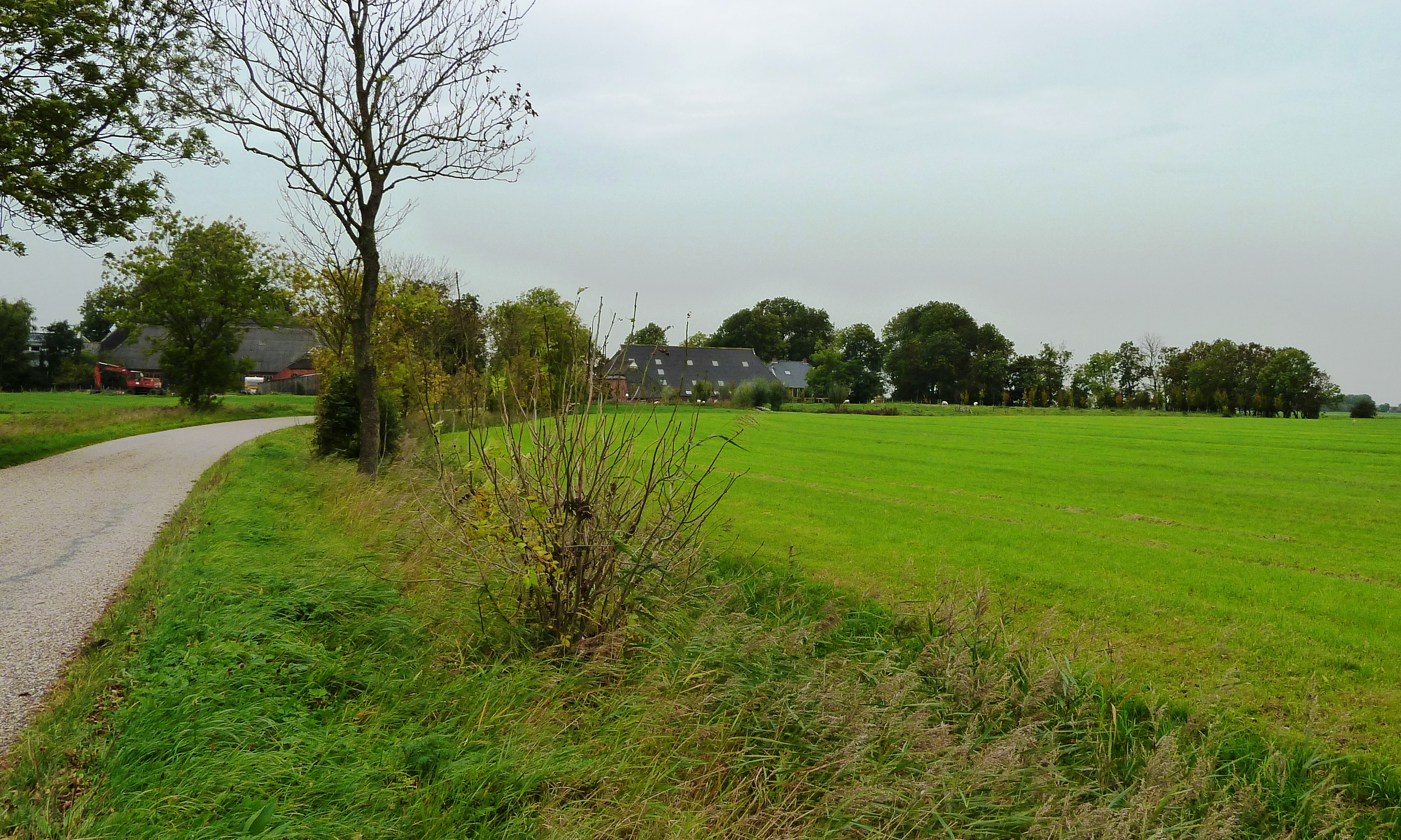 Het gehucht Frytum (Groningen, Nederland) gezien vanaf het oosten (vanaf Noordhorn/Oldehove). Links boerderij Frytema (1785). Rechts de wierde met boerderij Frytemaheerd (1818). Voor boerderij Frytemaheerd lopen schapen op het hoogste deel van de wierde (2,1 meter boven NAP).